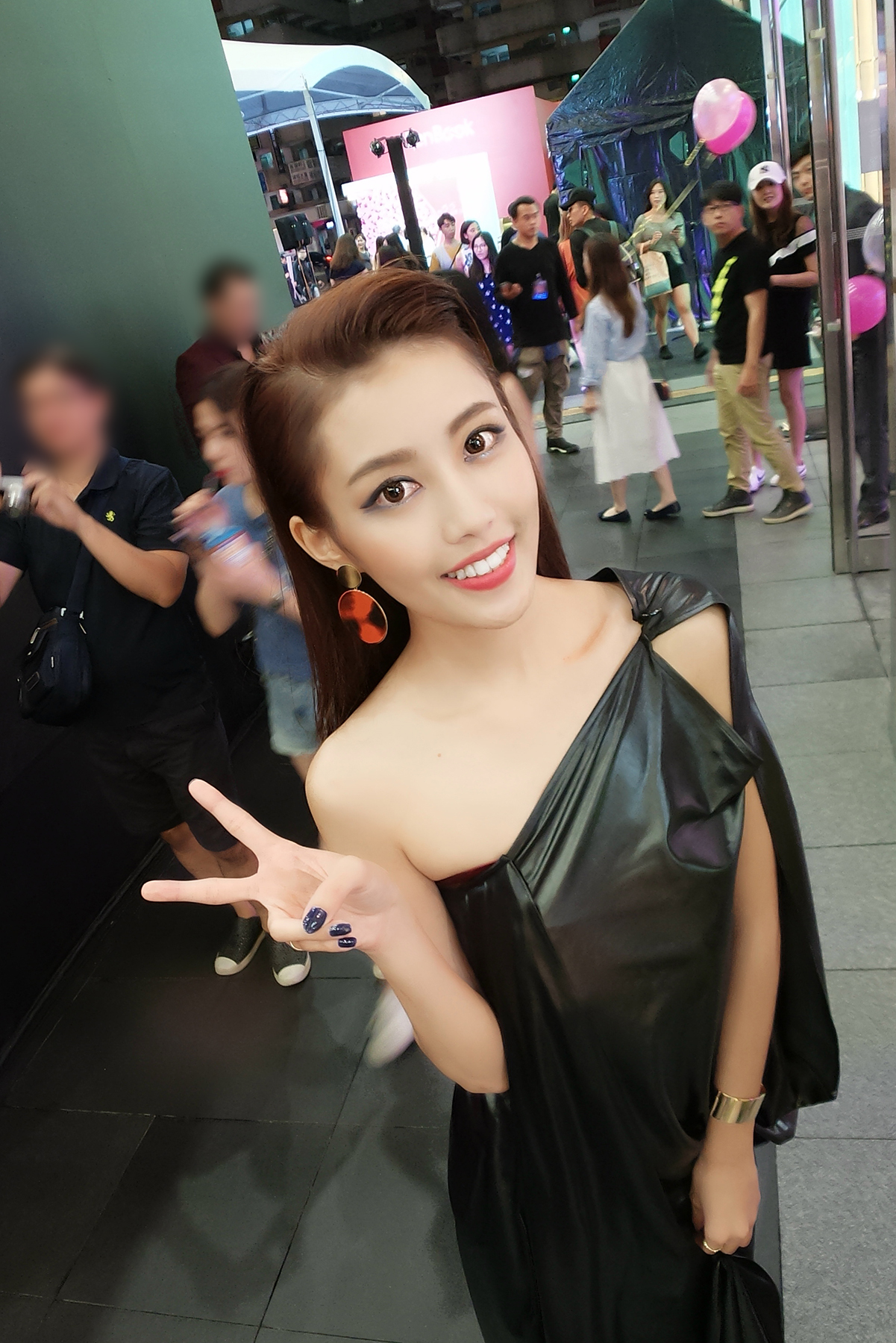 2018微風信義之夜 宋蘋恩為華碩ZenBook S筆電新色站台